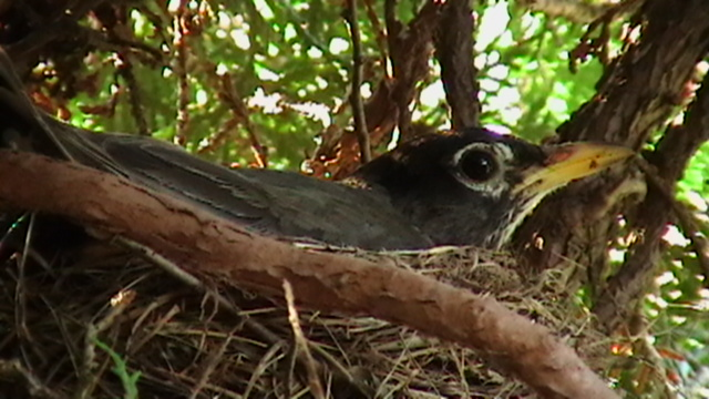 അടയിരിക്കുന്ന അമേരിക്കൻ റോബിൻ. ഫിലാഡെൽഫിയയ്ക്കു സമീപം ലാൻസ്ഡെയ്ലിൽ നിന്നും പകർത്തിയത്. ഛായാഗ്രാഹകൻ:മൻ‌ജിത്കൈനി